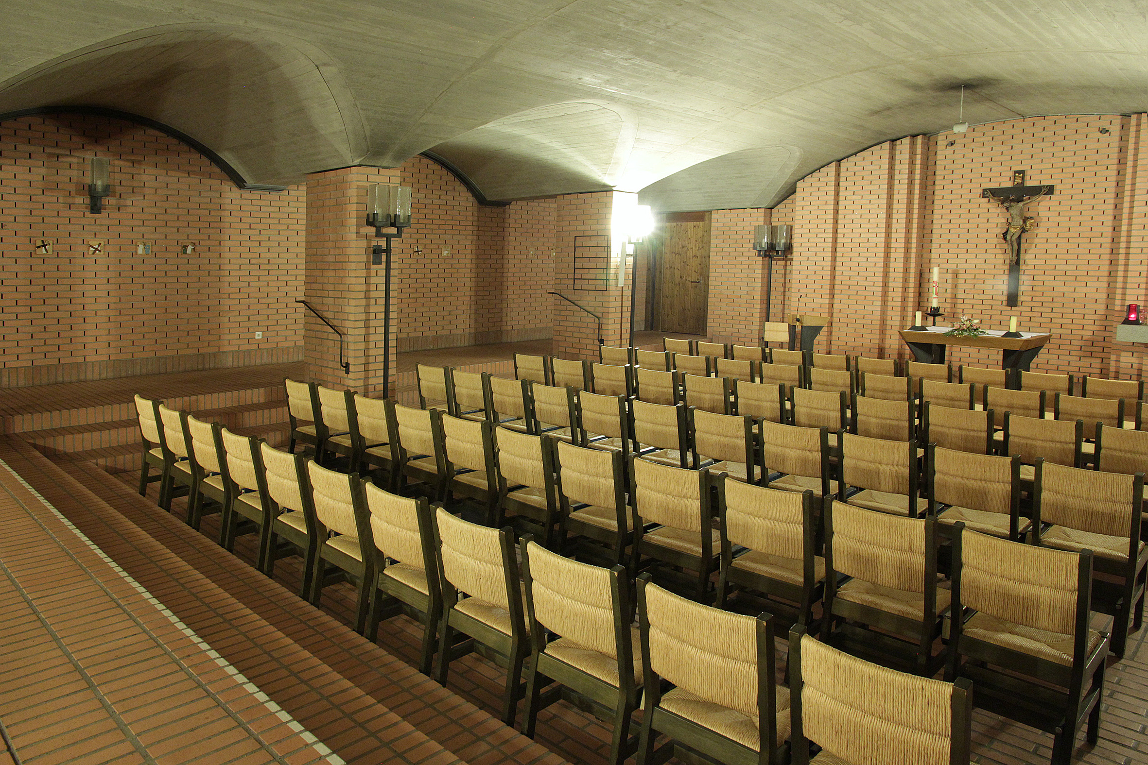 Römisch-katholische Kirche Liebfrauen Zürich